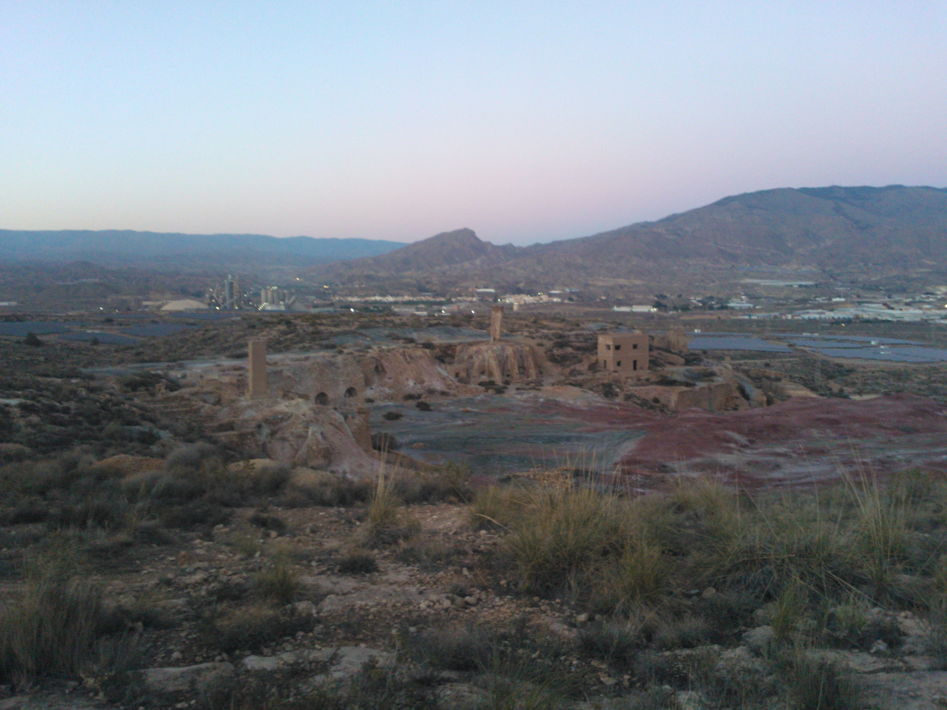 Vista general de las minas de la Partala